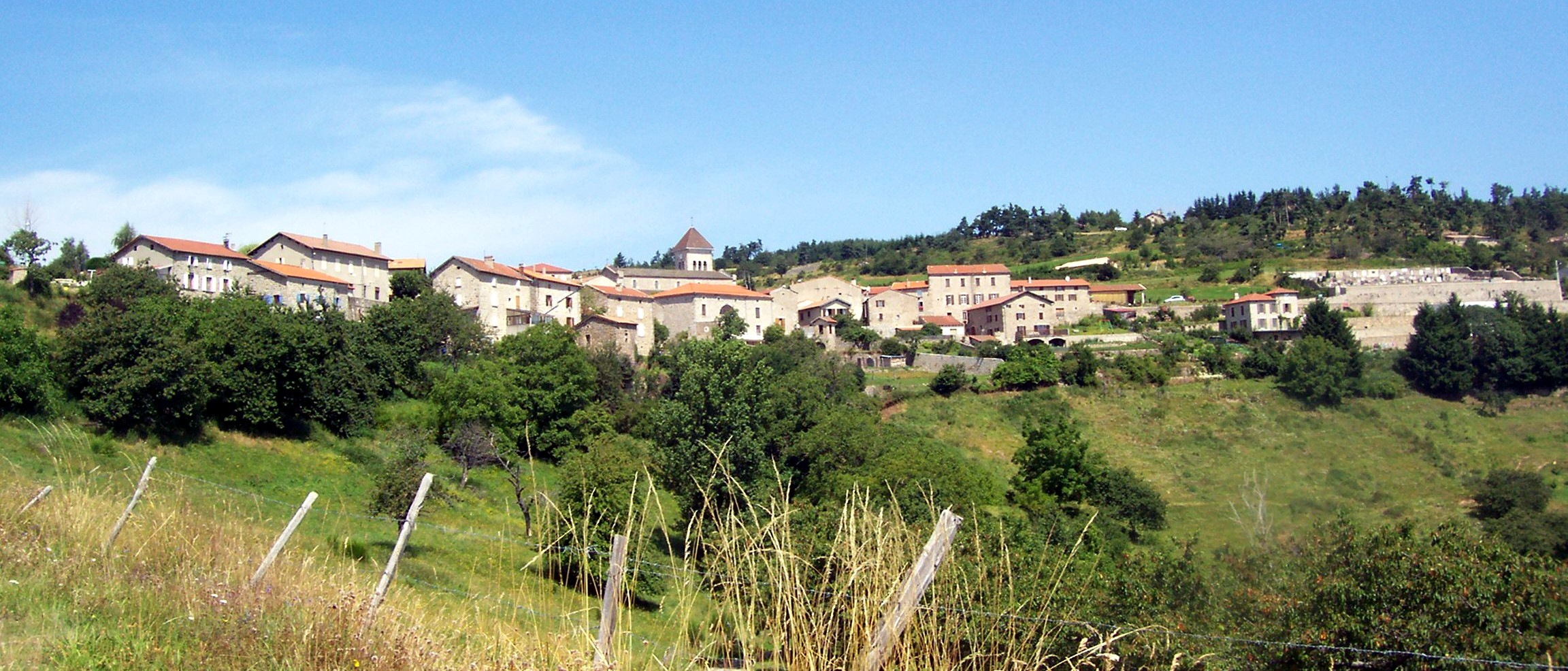 Le village de Nozières